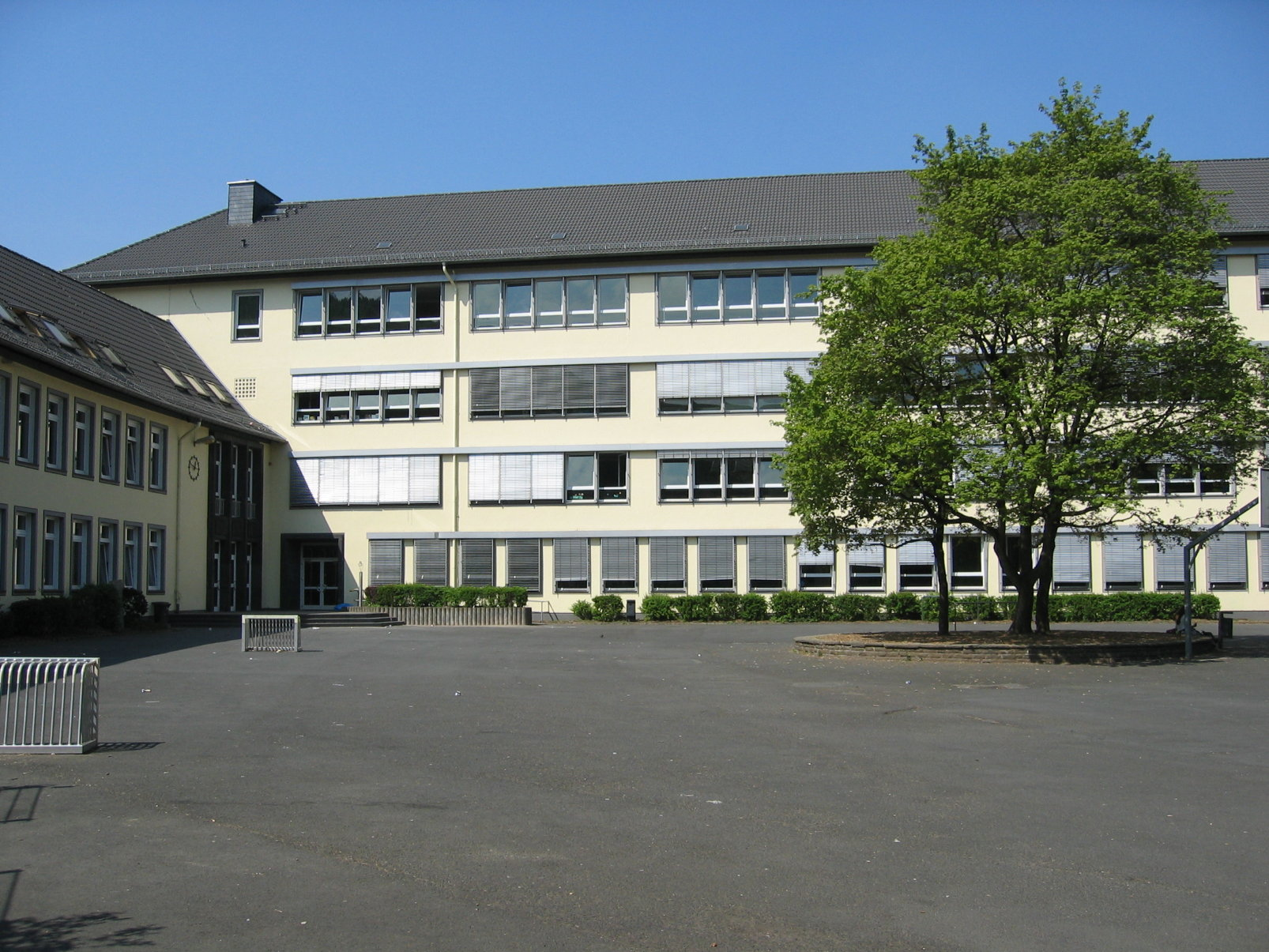 Schulhof des Gymnasiums am Löhrtor, Oranienstraße 27, Siegen